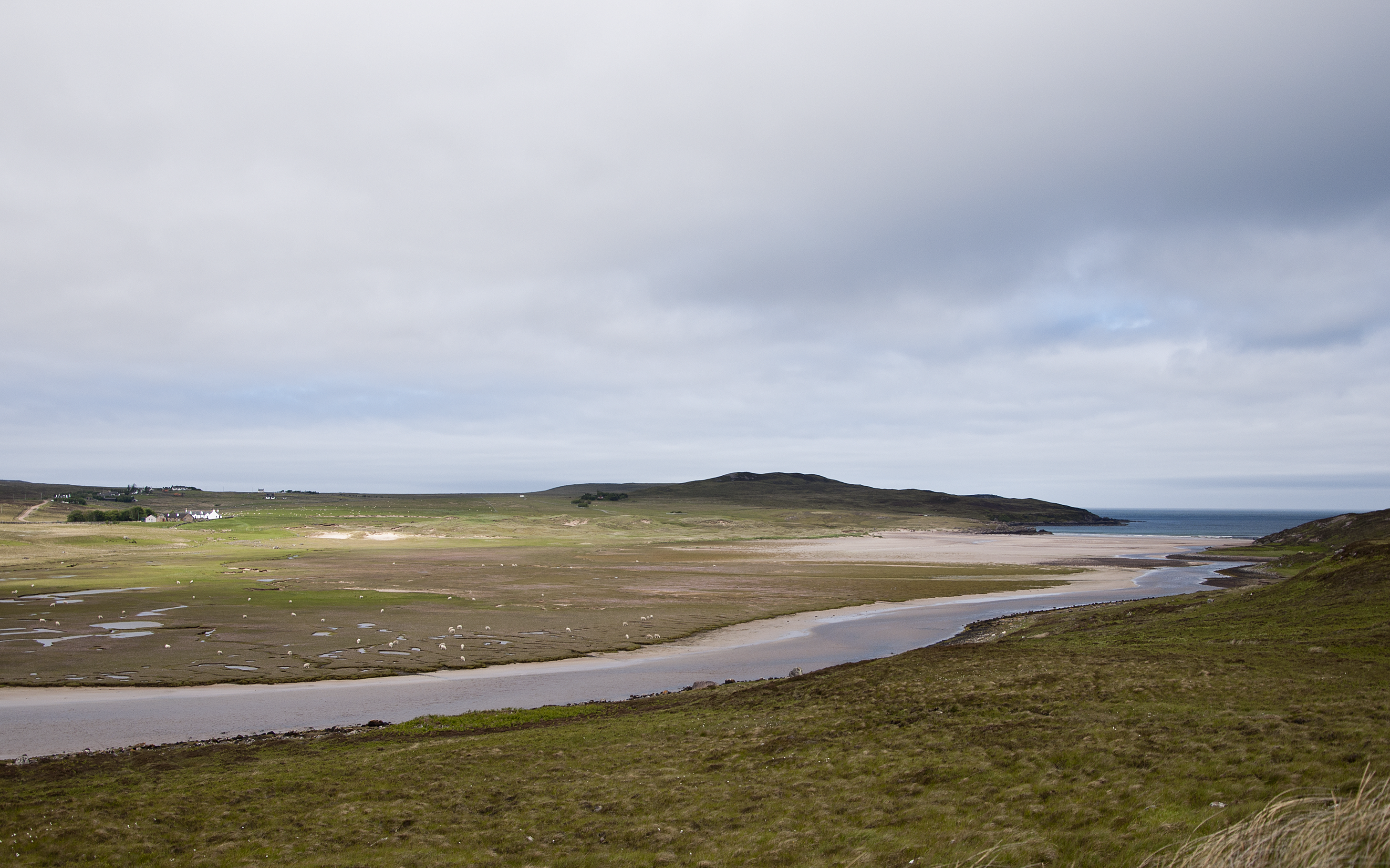 Achnahaird, Schotland